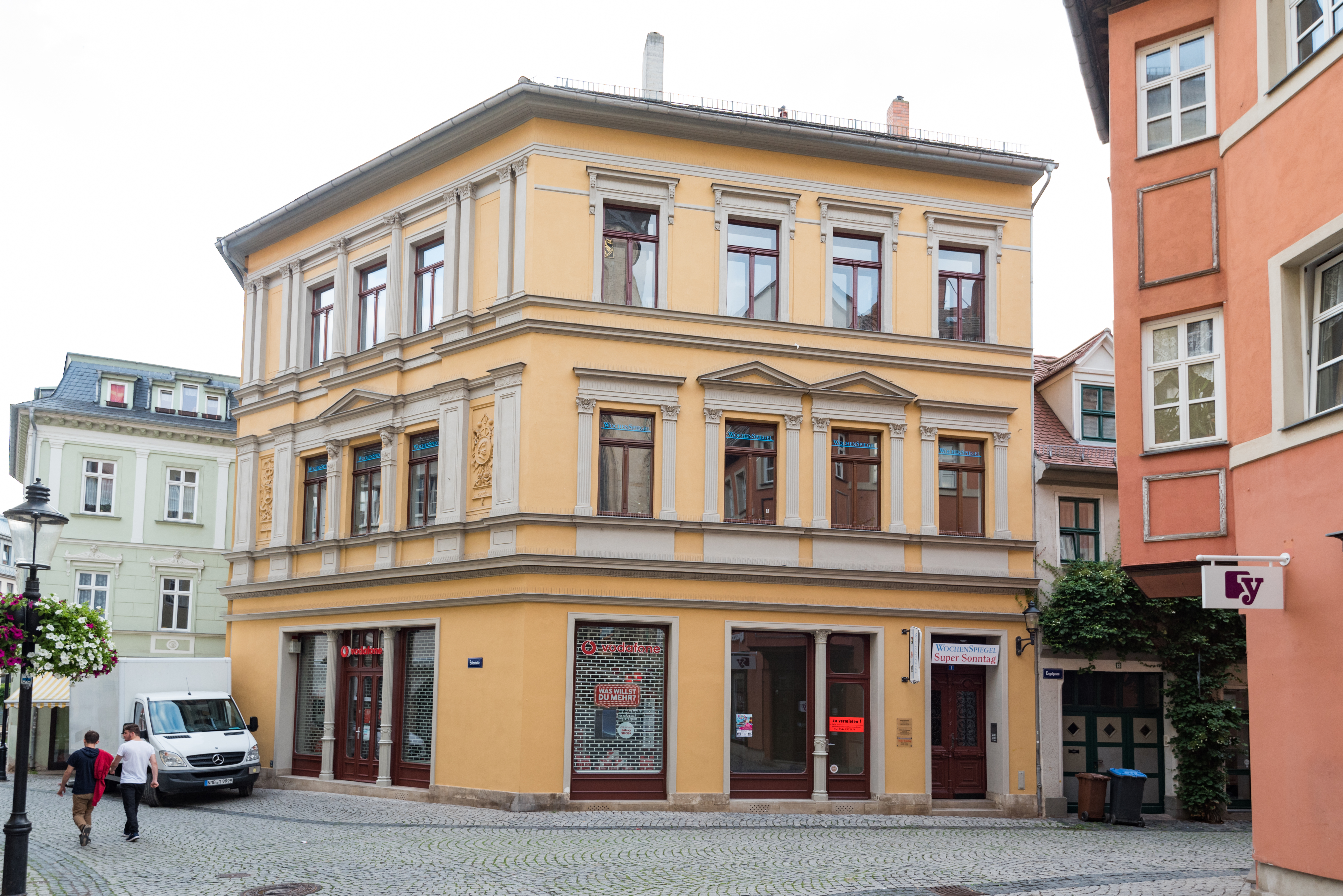 Naumburg (Saale), Salzstraße 1